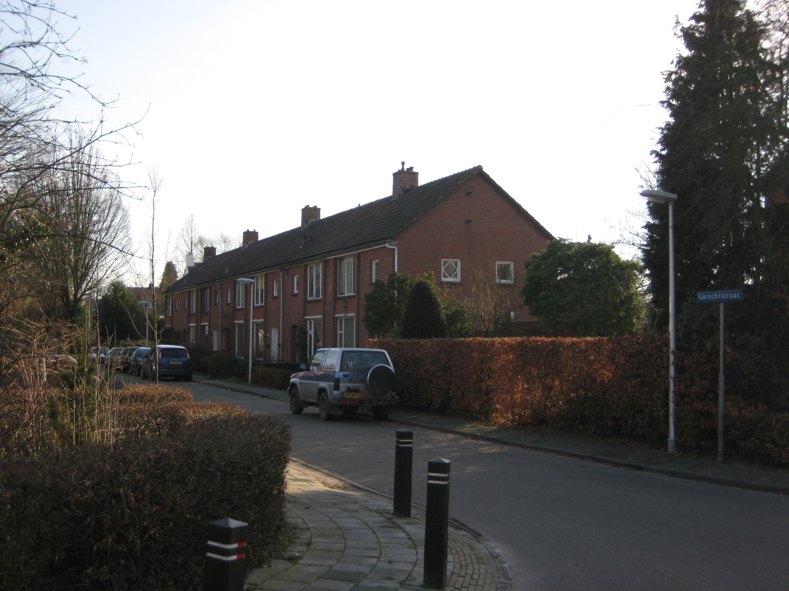 Gorechtstraat